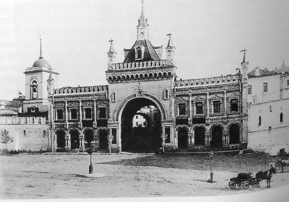 Tretyakovsky Proyezd arch, Moscow